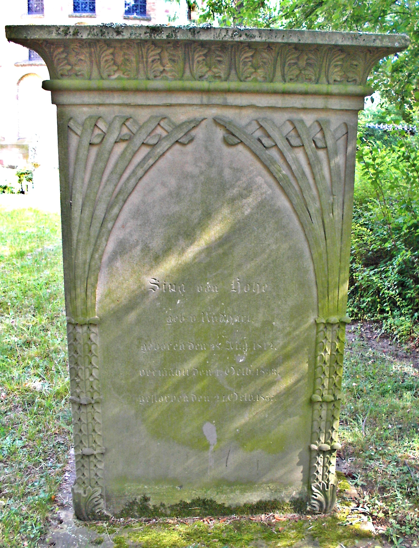 Grabstein Rosina von Hohe geb. Rudhart (1812-1857), Tochter des griechischen Ministerpräsidenten Ignaz von Rudhart und Frau des pfälzischen Regierungspräsidenten Gustav von Hohe.